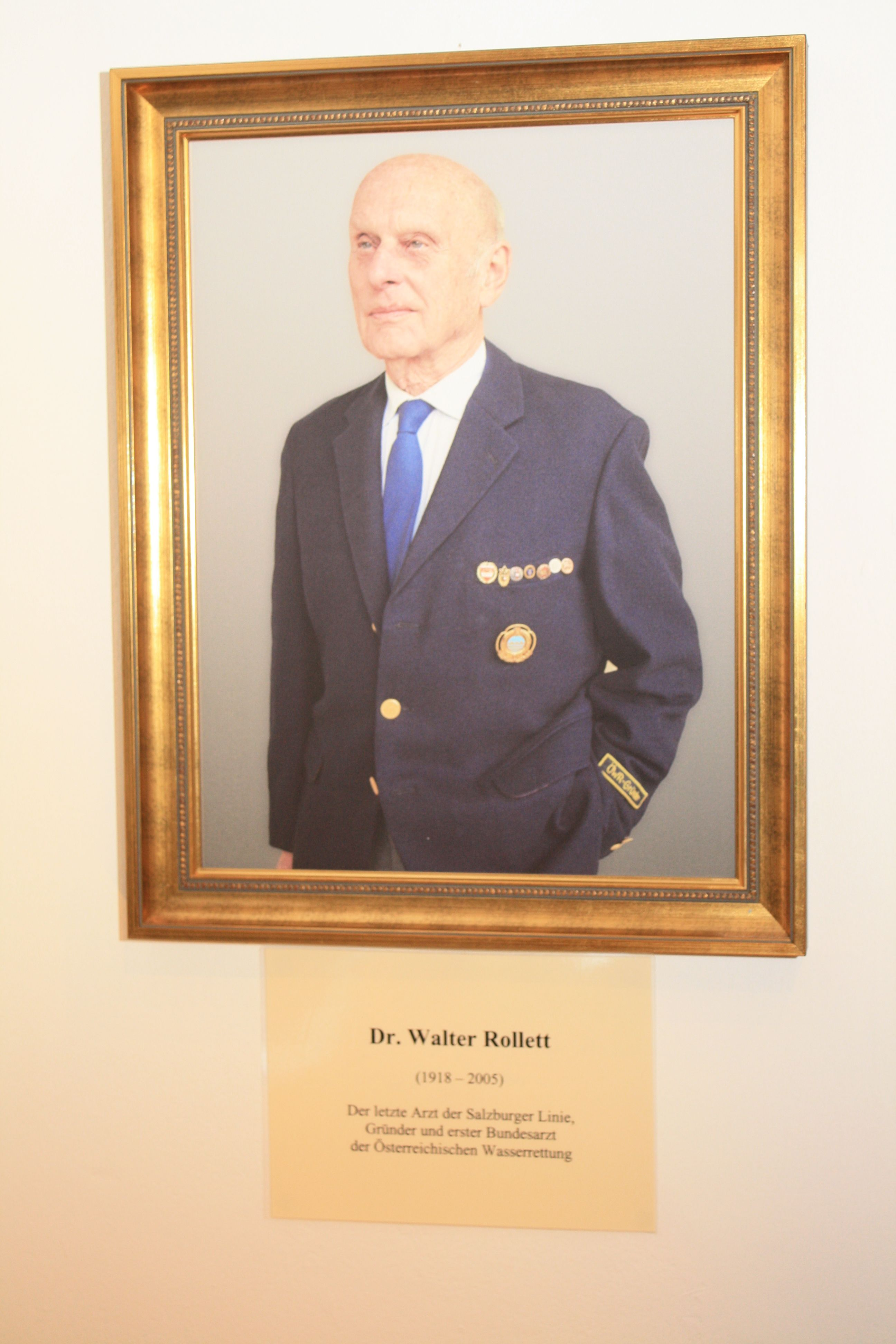 Bild von Walter Rollett im Rollettmuseum in Baden, Niederösterreich